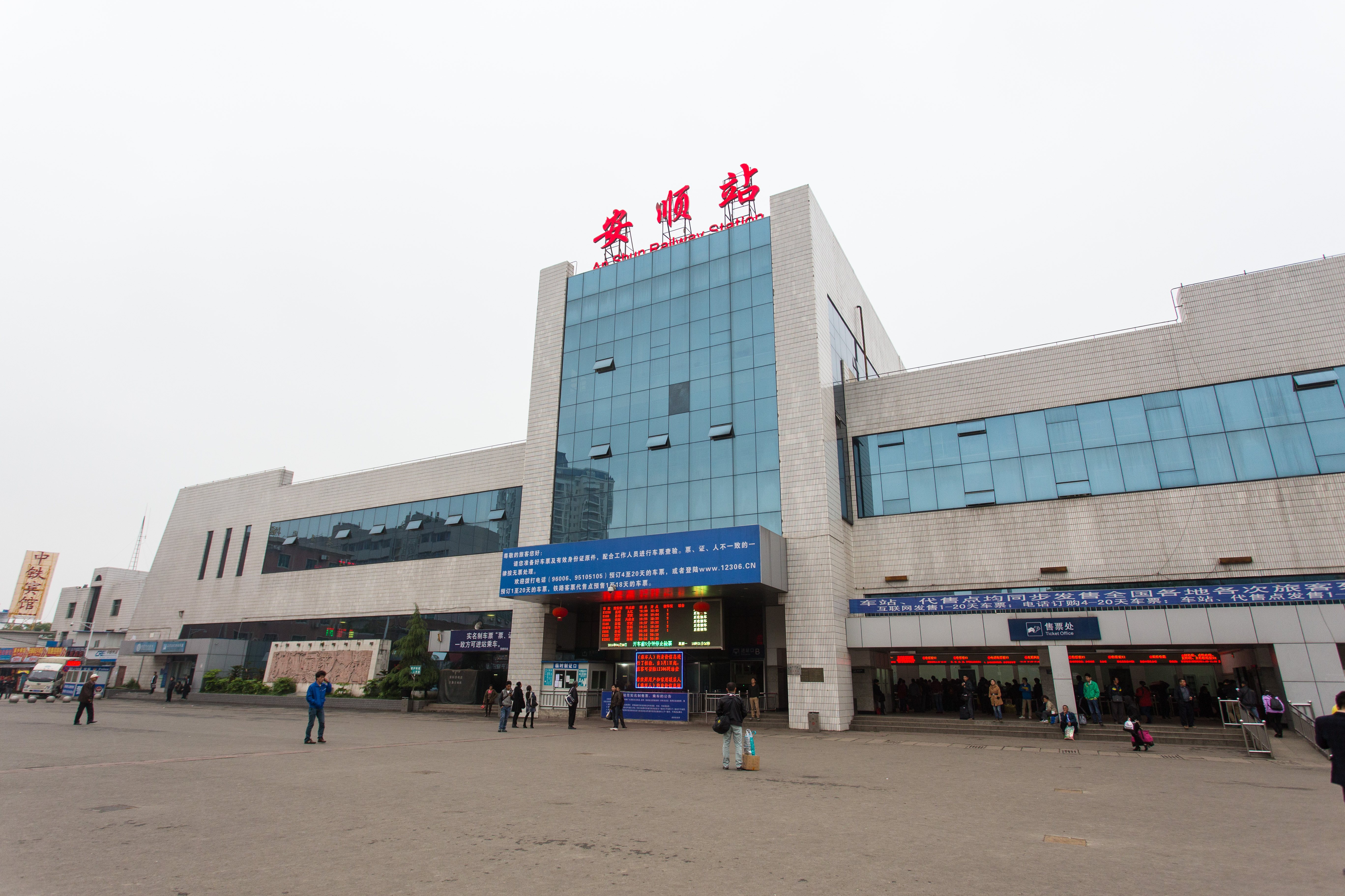 安顺火车站